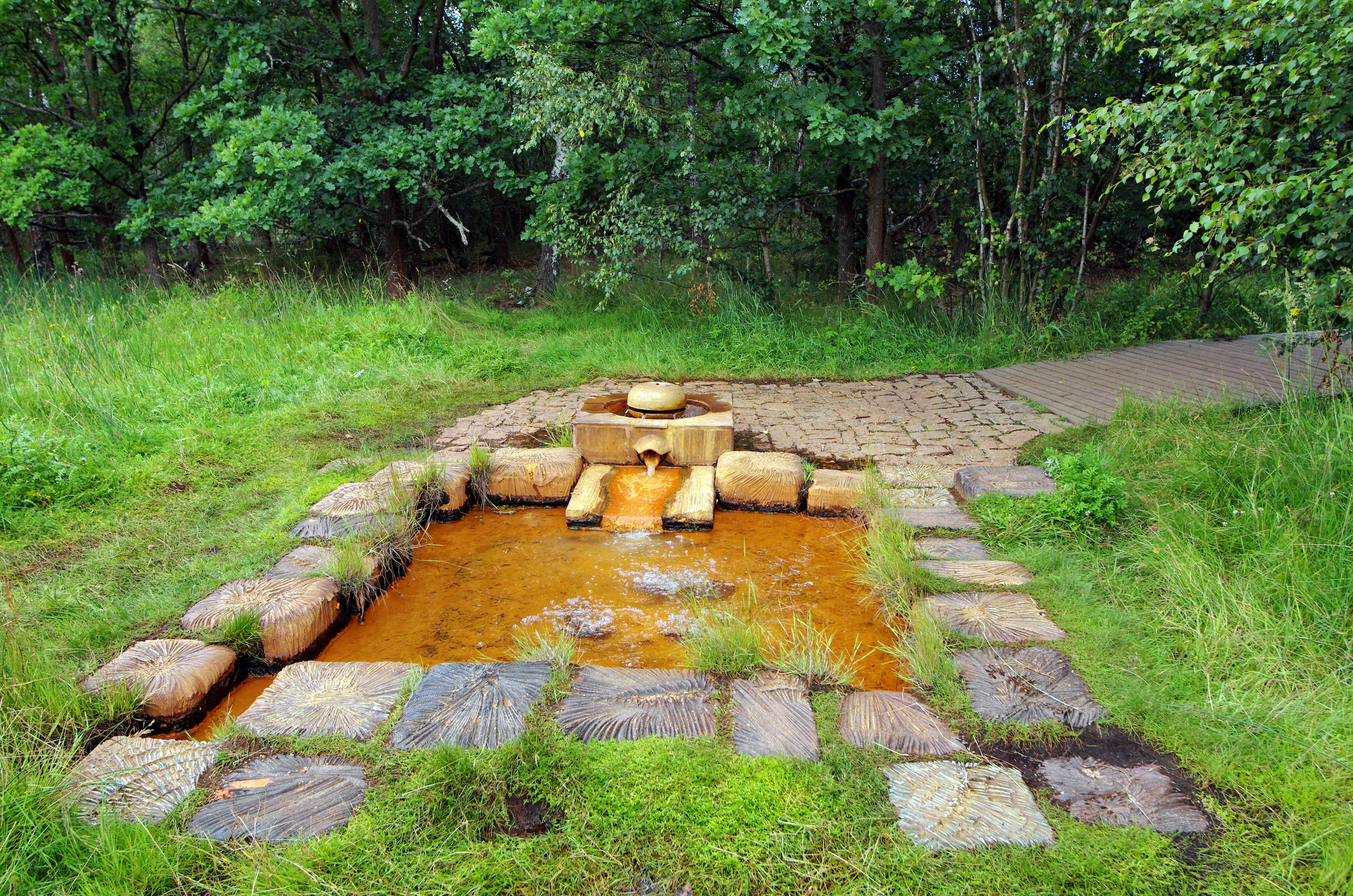 Národní přírodní rezervace Soos, Císařský pramen, okres Cheb